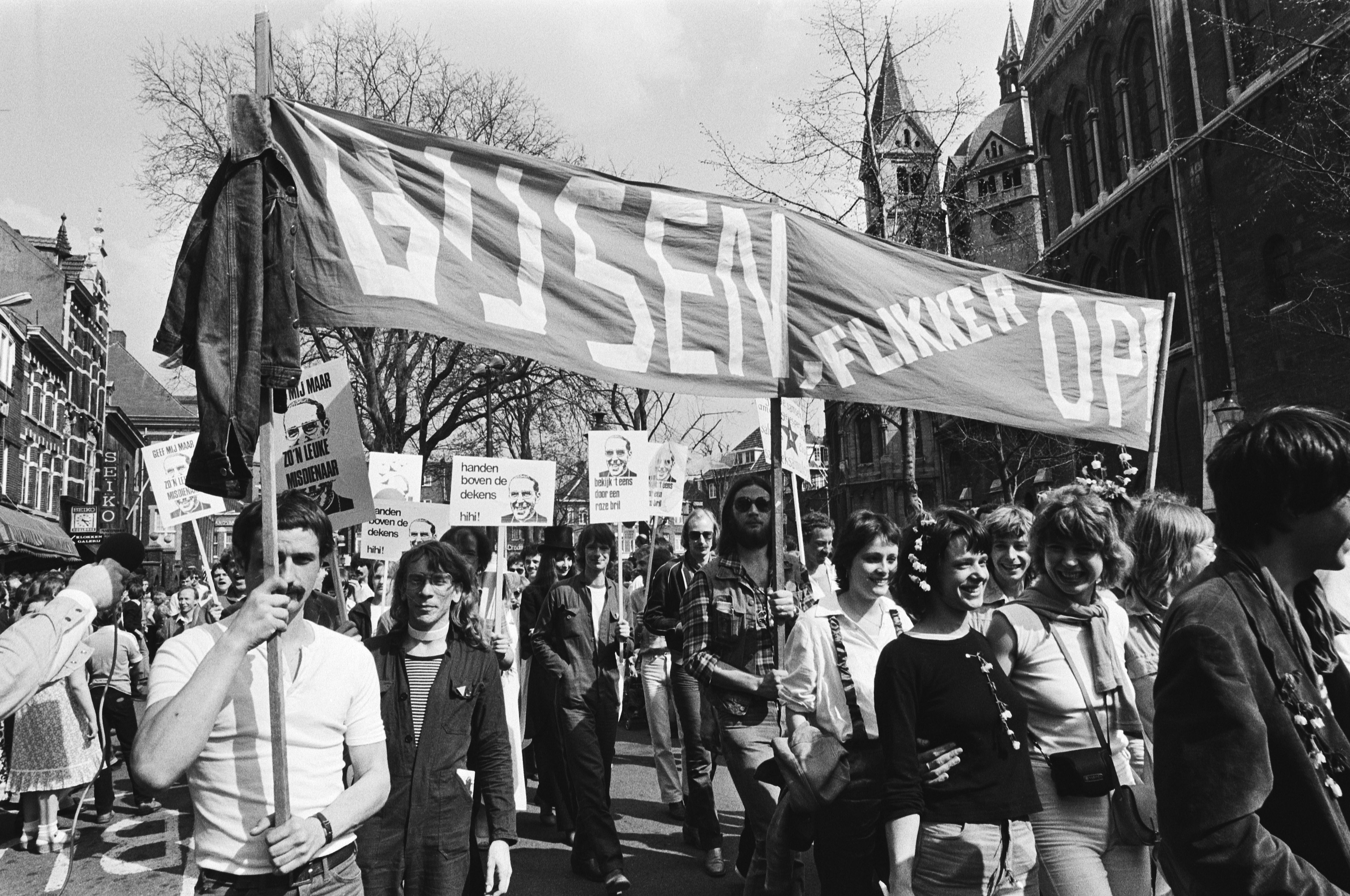 Collectie / Archief : Fotocollectie Anefo Reportage / Serie : Homosexuelen demonstreren in Roermond tegen uitlating bisschop Gijsen Beschrijving : Op het spandoek staat te lezen: "Gijsen FLIKKER op" Datum : 14 april 1979 Locatie : Limburg, Roermond Trefwoorden : betogingen, bisschoppen, homoseksuelen, spandoeken Persoonsnaam : Gijsen, Jo Fotograaf : Dijk, Hans van / Anefo Auteursrechthebbende : Nationaal Archief Materiaalsoort : Negatief (zwart/wit) Nummer archiefinventaris : bekijk toegang 2.24.01.05 Bestanddeelnummer : 930-2170